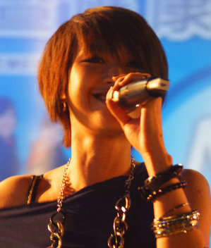 中文（台灣）: 宥心IN經國管理學院校慶演出